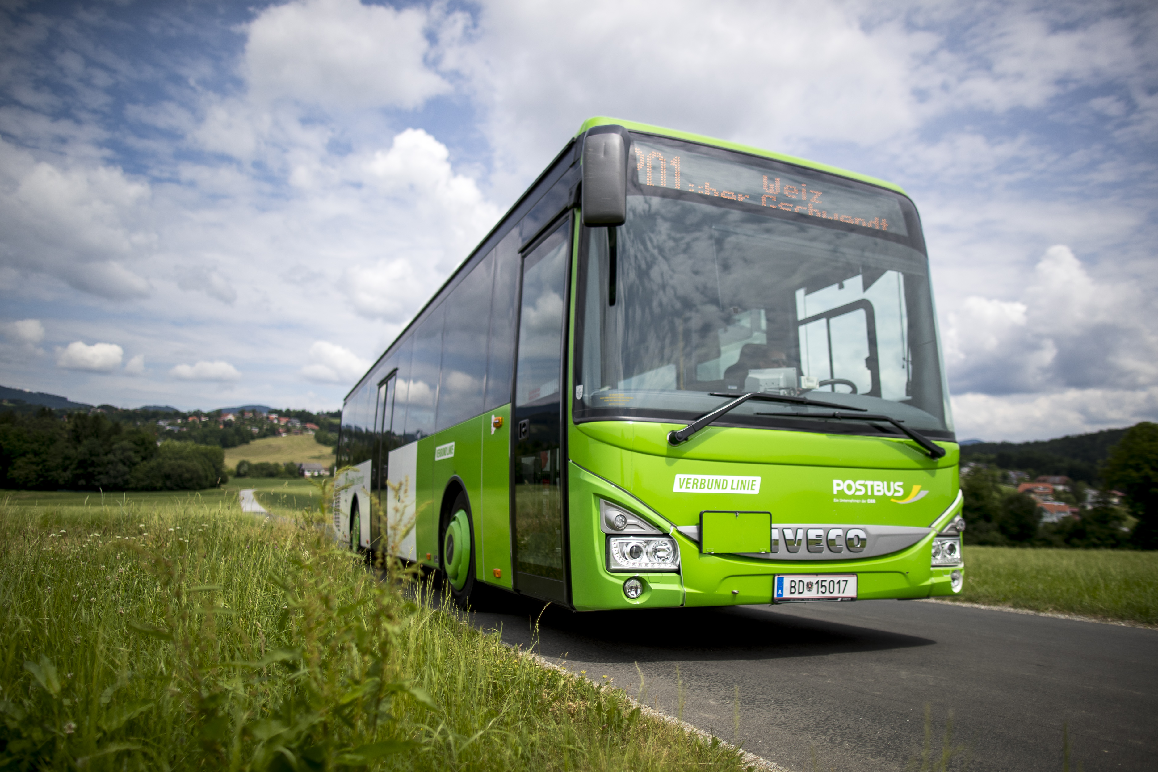 Bus der ÖBB-Postbus GmbH im RegioBus-Design